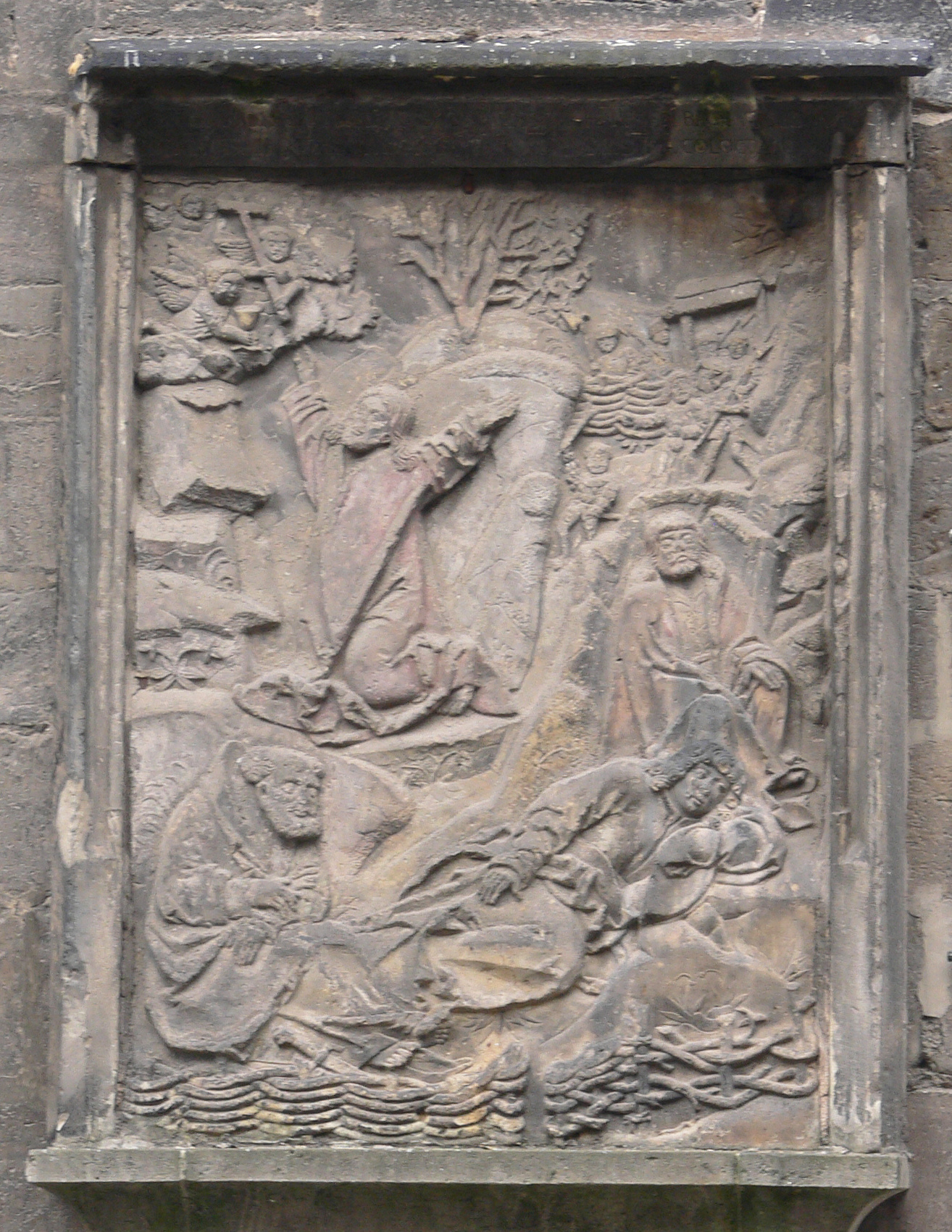 Erfurt, Anger, Bartholomäusturm, Epitaph des Johannes Selbach, um 1577, mit Ölbergszene